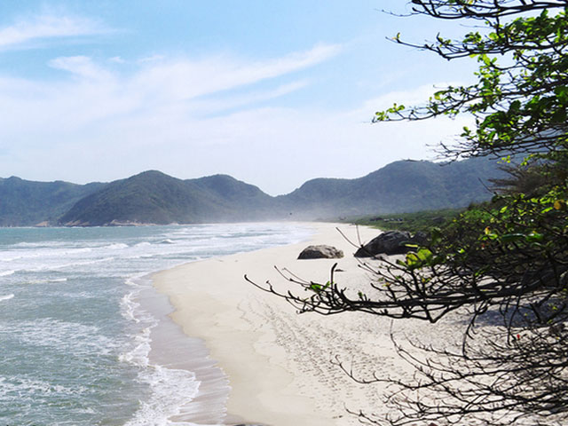 Praia de Grumari, situado em Grumari, Rio de Janeiro, Brasil. Esta foto foi tirada para ser incorporada ao site e disponibilizada ao público sem restrições.